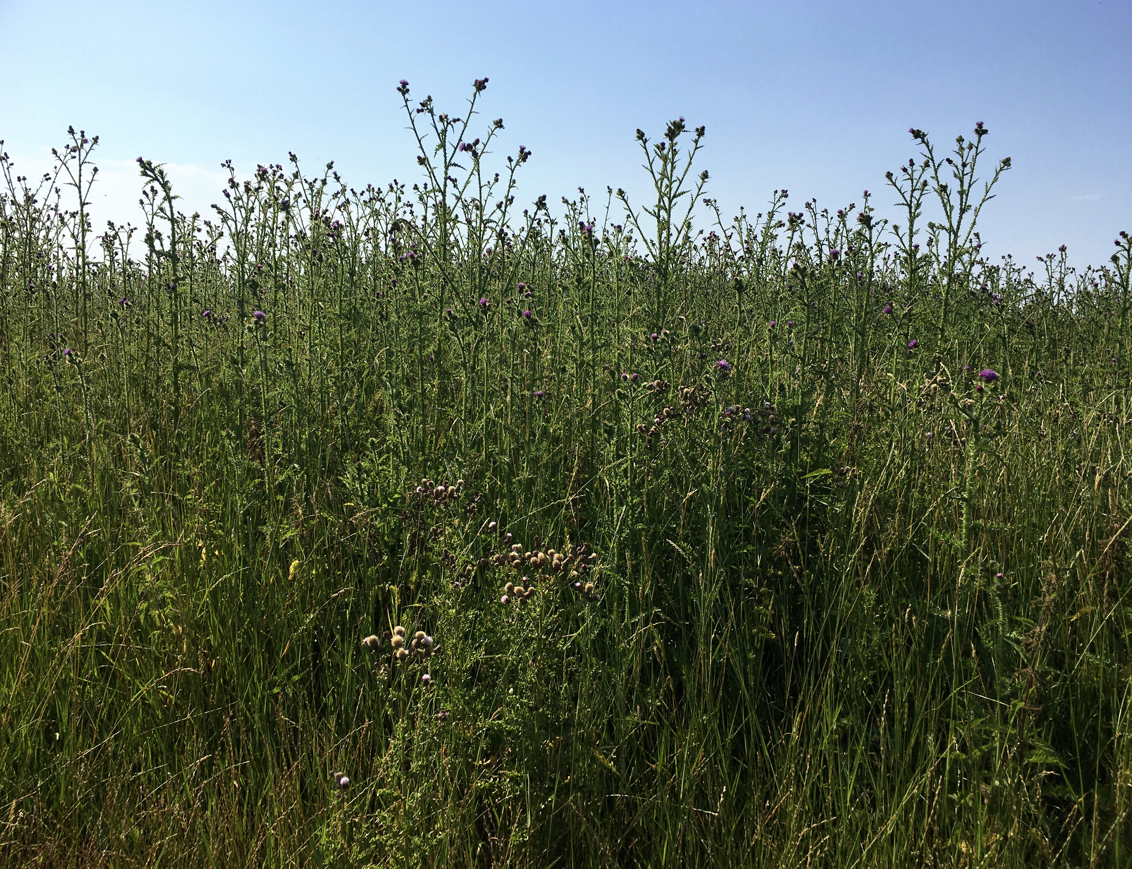 Een ruigte met distels in de uiterwaarden van de Waal